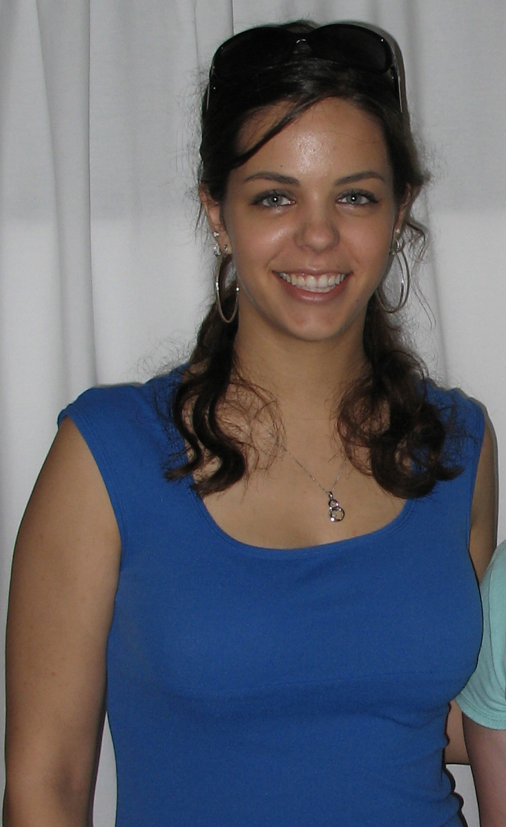 Melissa McIntyre